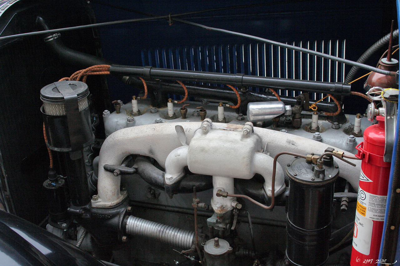 Engine bay 1926 Studebaker Big Six Sedan